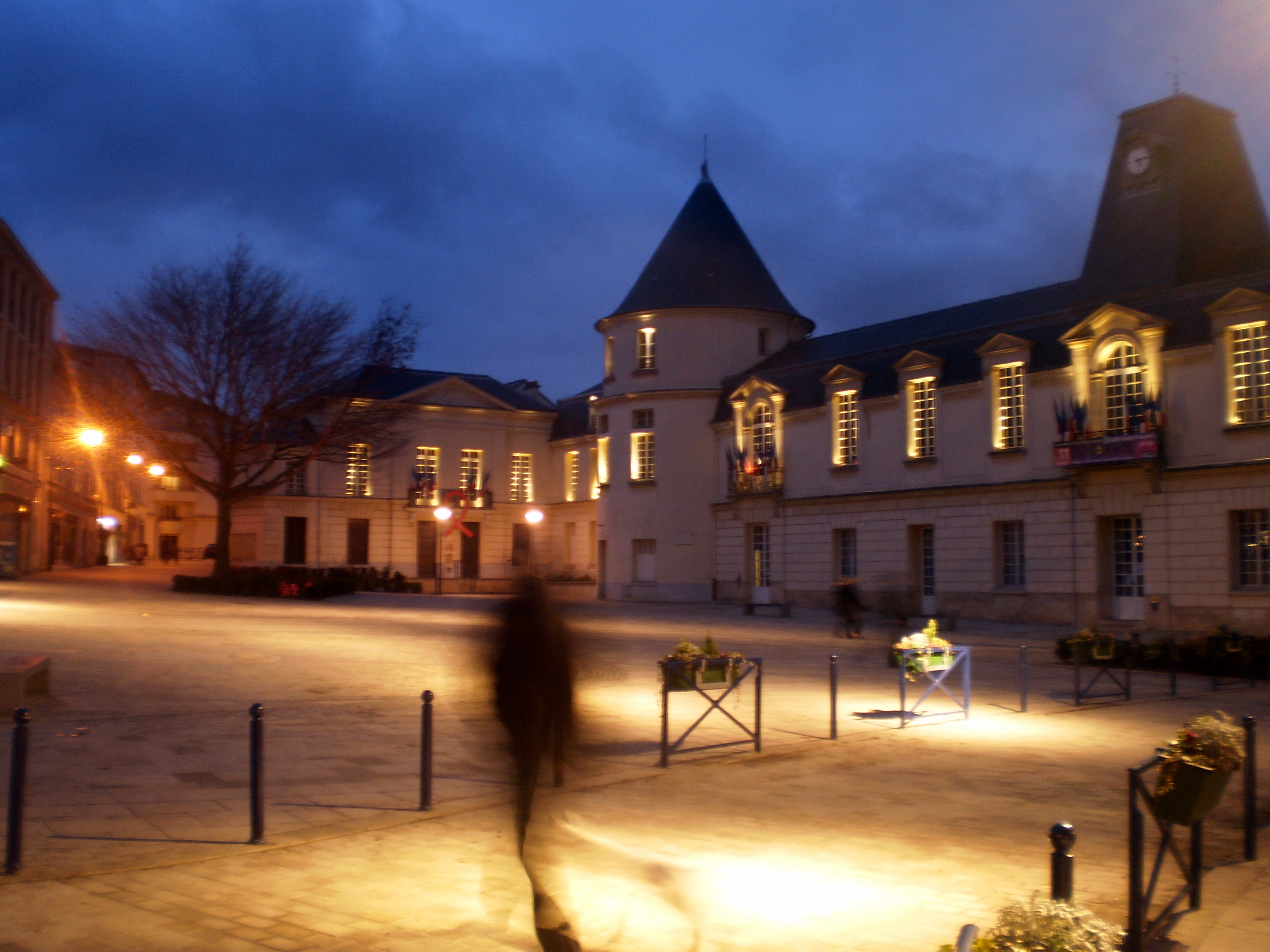 Mairie de Clamart (92)